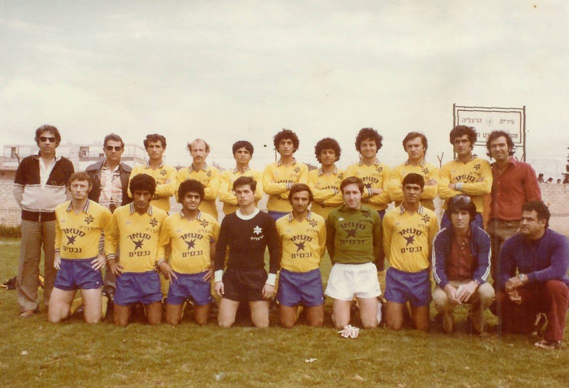 סגל קבוצת הכדורגל מכבי הרצלייה עונת 1978/1979. עומדים משמאל לימין: לוי עודד סגל ניהולי, אליעזר שפיגל מאמן, ניסים כהן, אברהם מן, צורי חדד, רחמים עמרן, מוטי פלח, איתן קונסט, בוריס נורמן, יוסף סנין, אהרון מסיקה סגל ניהולי שורה תחתונה משמאל לימין: היבש שמעון, פוגל יעקב, טיירי מאיר חסון אריק, לביא הרצל, לנדסברג משה, צמח צביקה, שידלובסקי יעקב-סגל ניהולי ומעסה הקבוצה